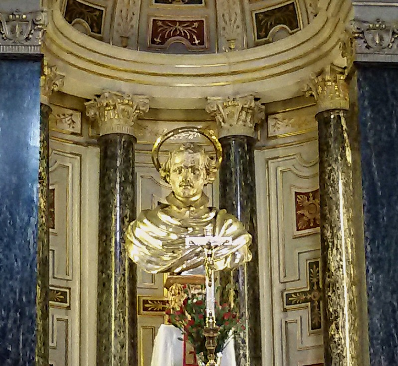 Buste reliquaire de Saint Yves en bois doré de 1637~Eglise Saint-Yves-des-Bretons (Sant'Ivo dei Bretoni), église nationale des Bretons à Rome.